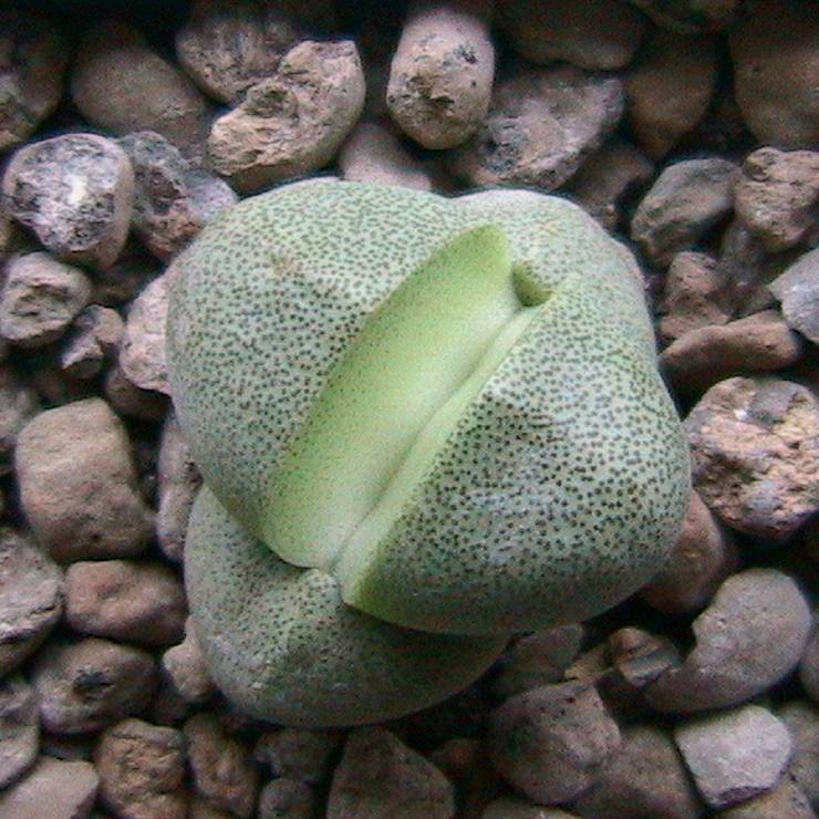 Gyvasis akmuo, Lithop, priklauso šeimai Mesembryanthemaceae (Aizoaceae).